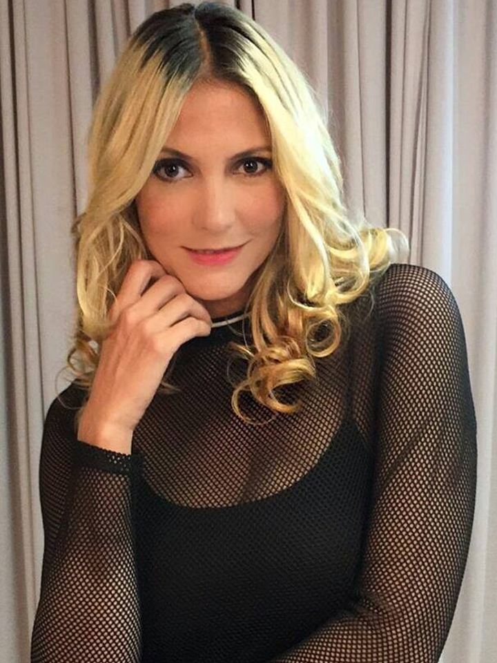 Cecilia Piñeiro Actriz y Modelo Mexicana